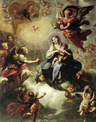 Coronación de la Virgen, Paniza (Zaragoza), iglesia parroquial de Nª Sª de los Ángeles